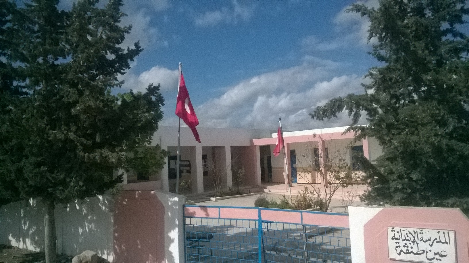 Aïn Tounga, Tunisie عين تونقة, تونس